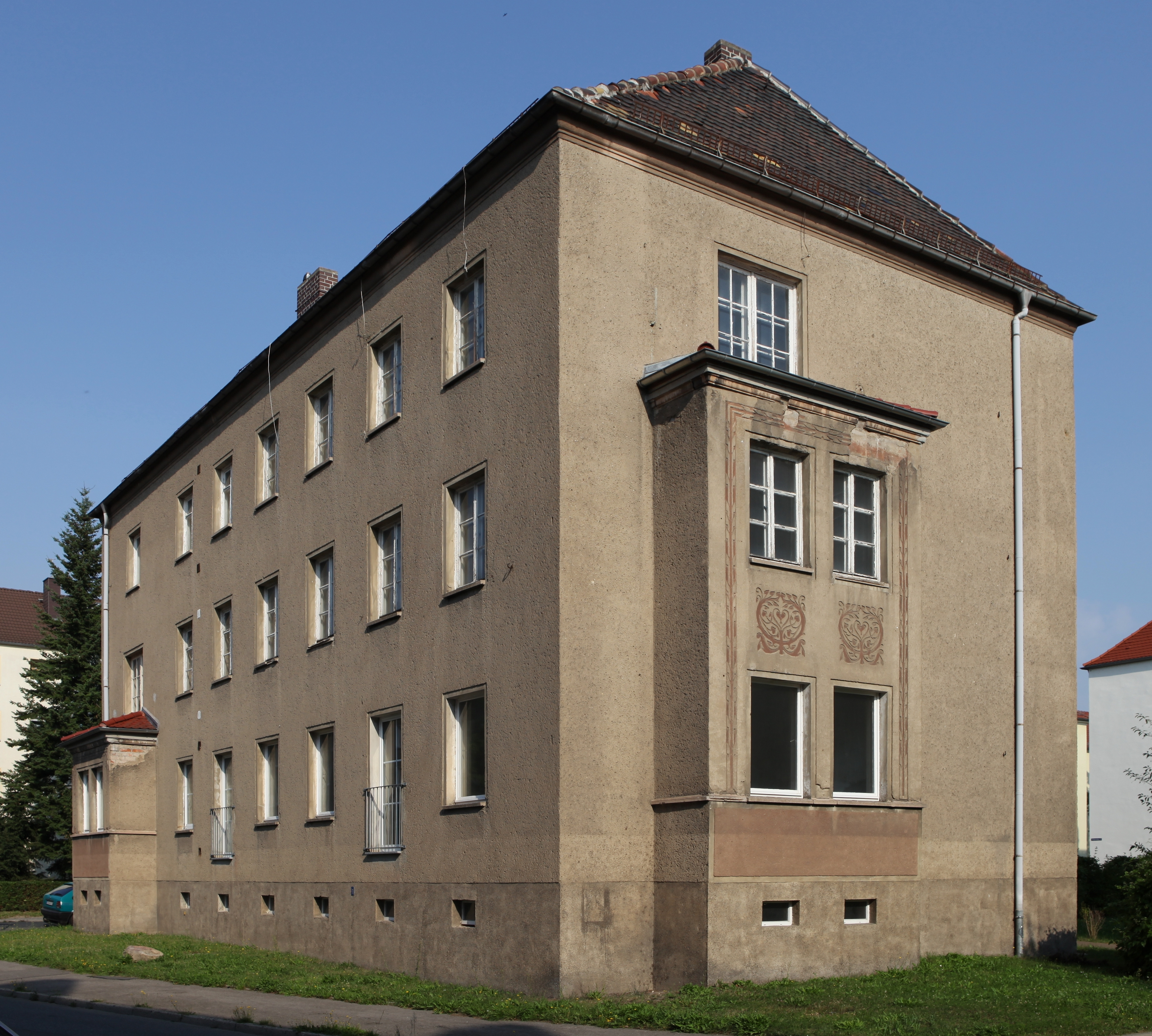 Kulturdenkmal Mietshaus Karlstraße 4 in Eilenburg; Objektnummer: 08973241